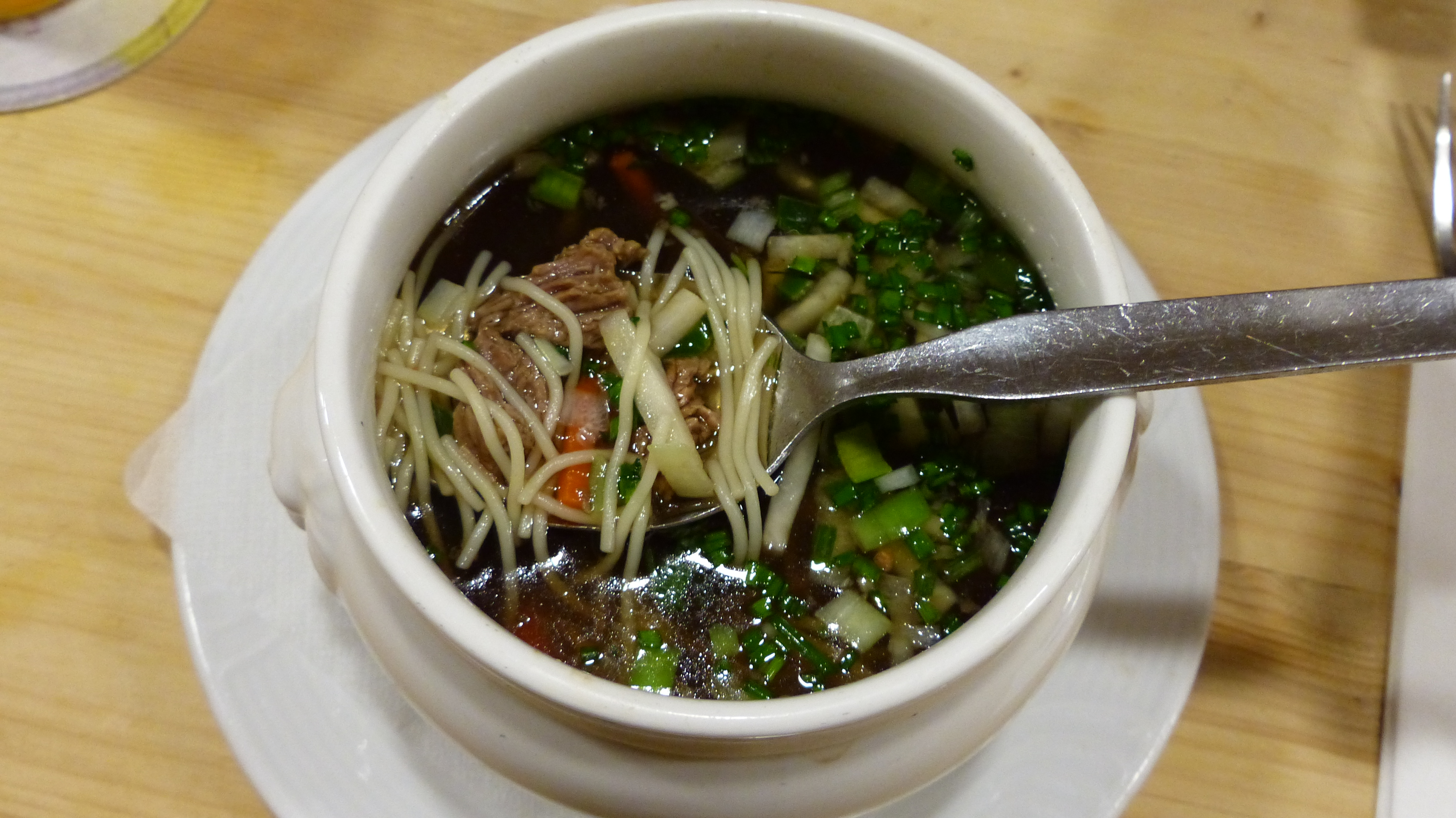 Alt Wiener Suppentopf, Café Restaurant Schönbrunn, Wien